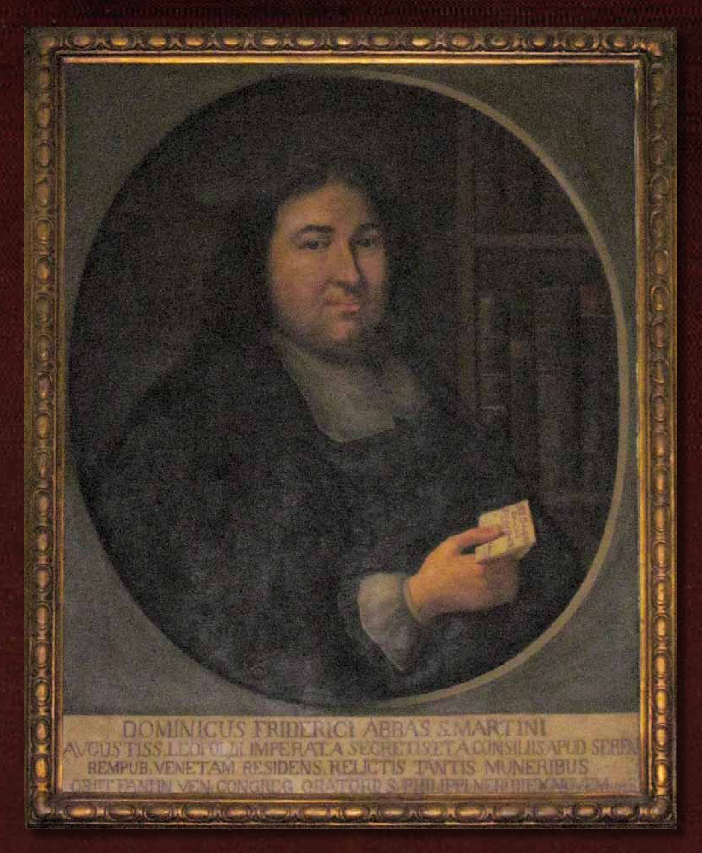 Ritratto di Domenico Federici raffigurato come un esponente della "Repubblica delle Lettere", conservato presso la Sala dei Globi della Biblioteca Federiciana di Fano (autore sconosciuto, dipinto dopo il 1721).